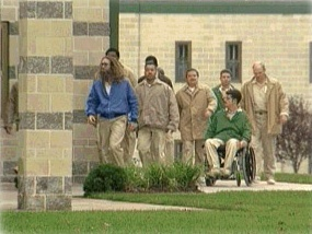 Hofgang